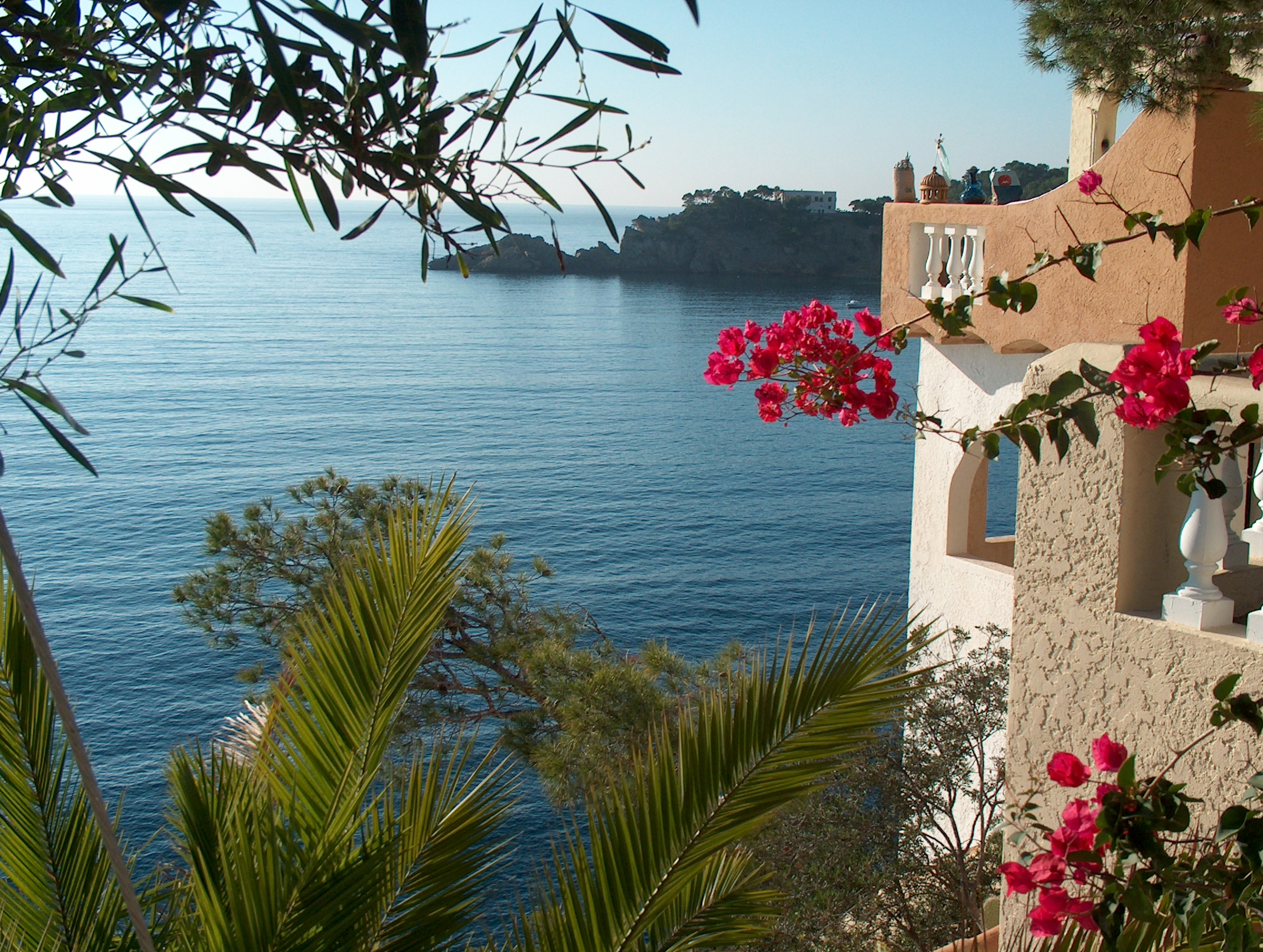 Cala Fornells "Blick auf´s Meer" (in der Nähe von Paguera).